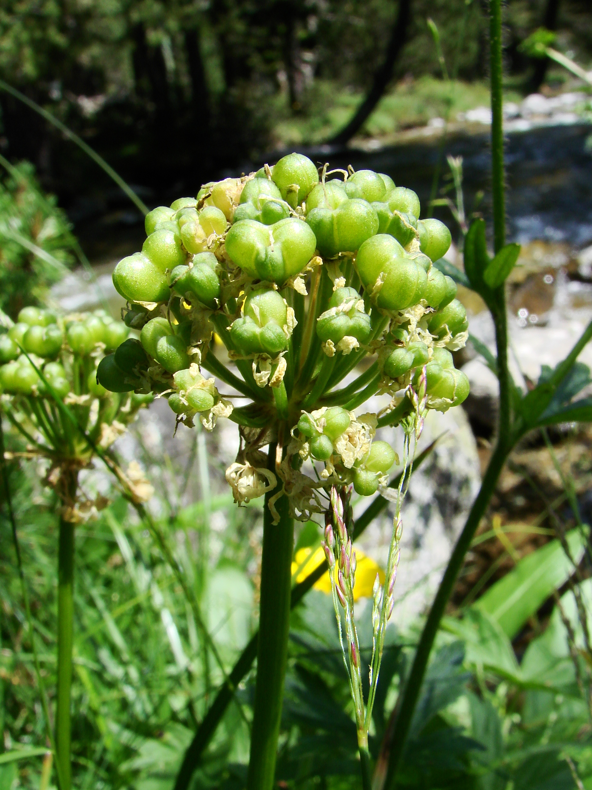 Vallée du Marcadau, Pyrénées françaises, commune de Cauterets, département des Hautes-Pyrénées (France) : Allium victorialis en fruit